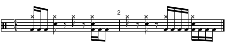 Пример нотной записи музыкального брейкдауна